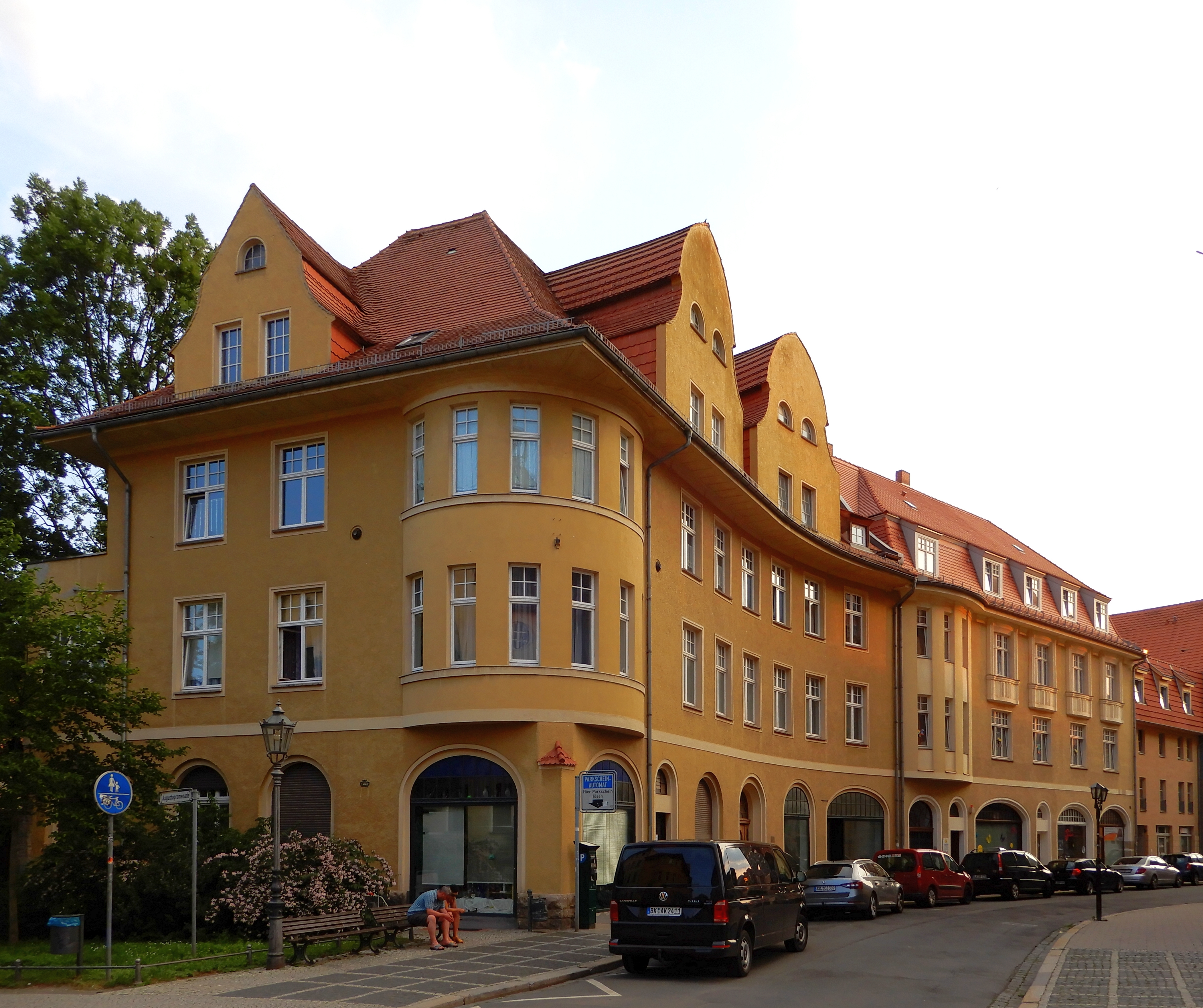 Gebäude Hecknerstraße 1-3 in Aschersleben